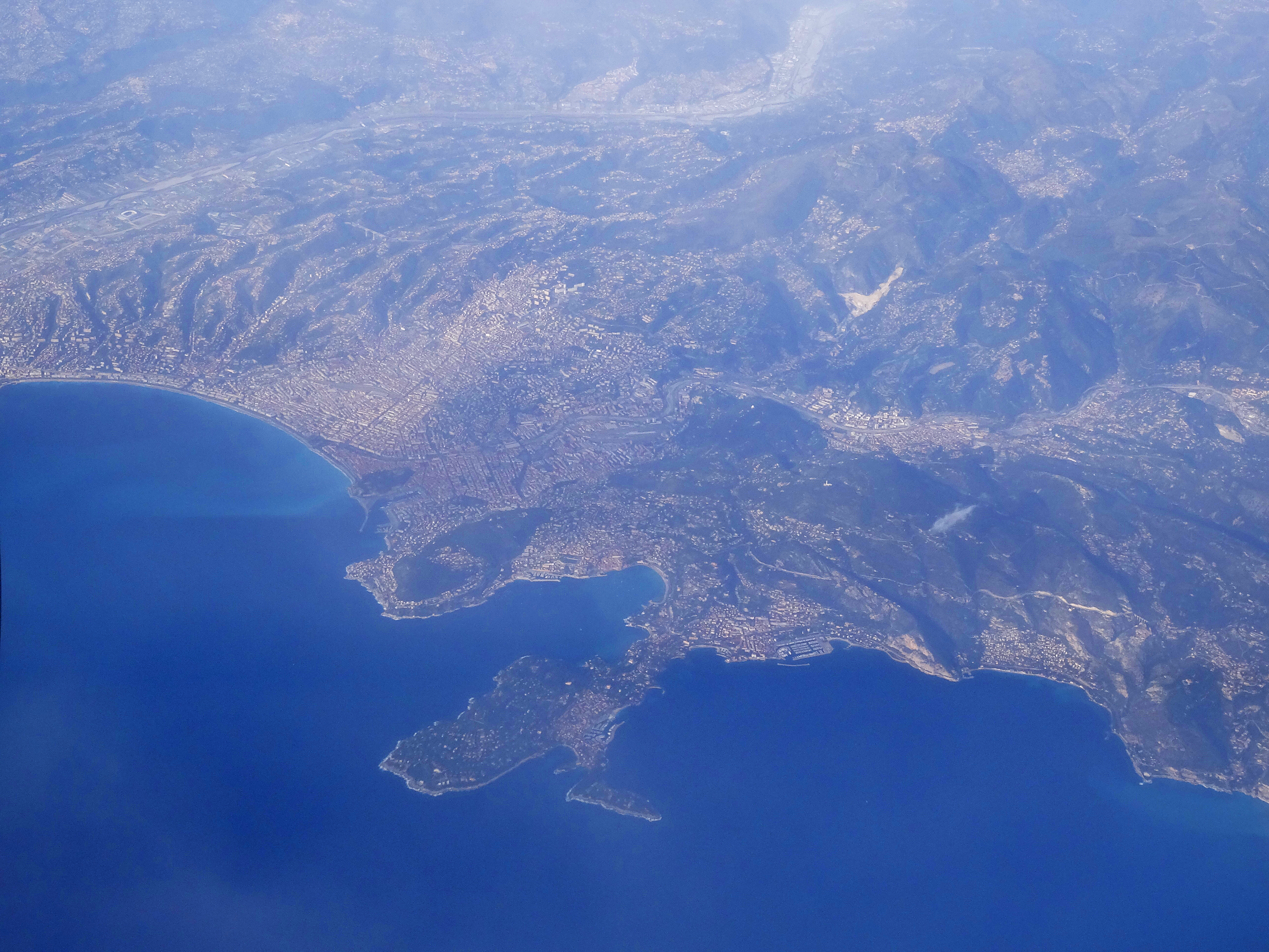 Frankreich: Luftaufnahme von Nizza